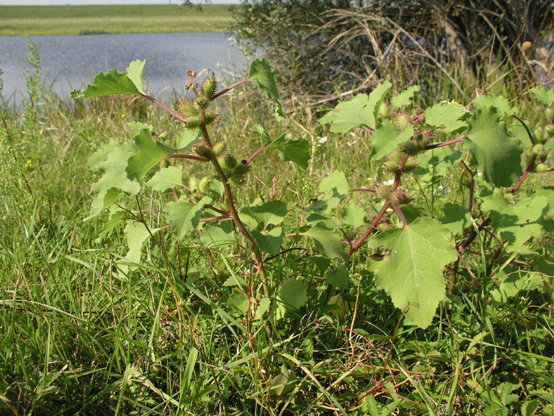 Die Elbspitzklette (Xanthium albinum subsp. albinum) - eine besondere Stromtalpflanze an der Elbe.